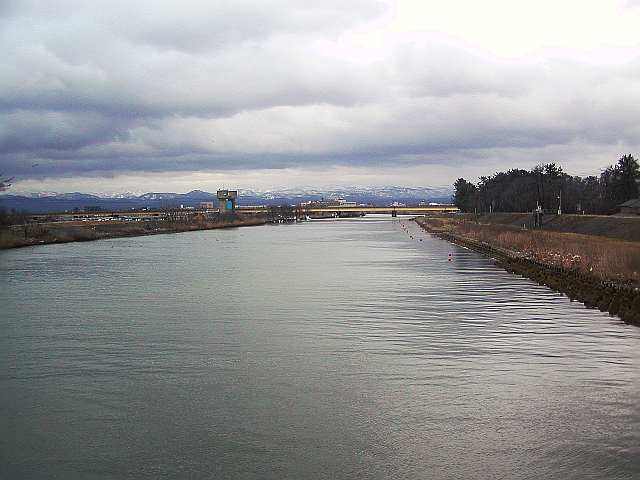 撮影者による投稿